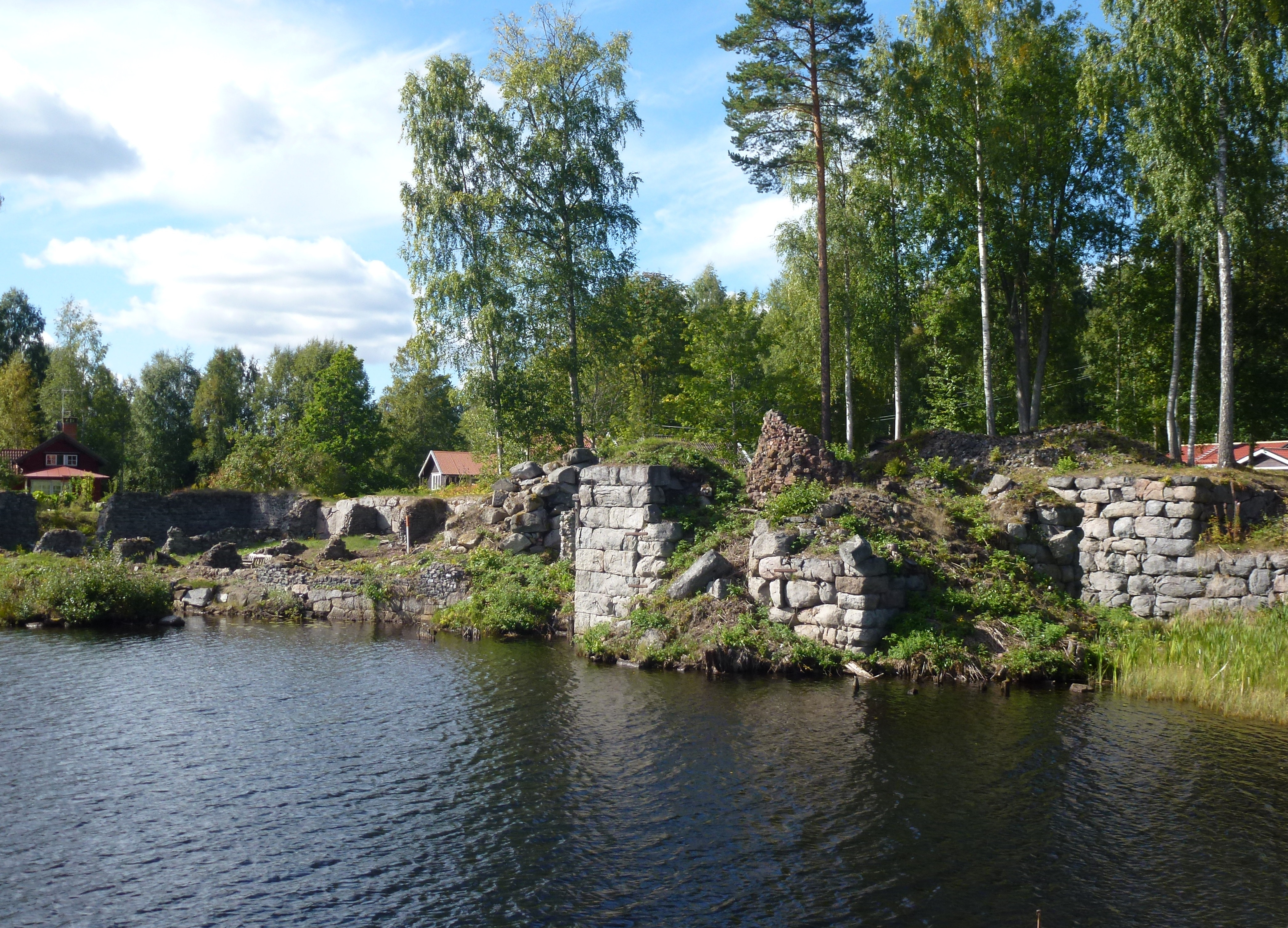 Norhyttans masugn